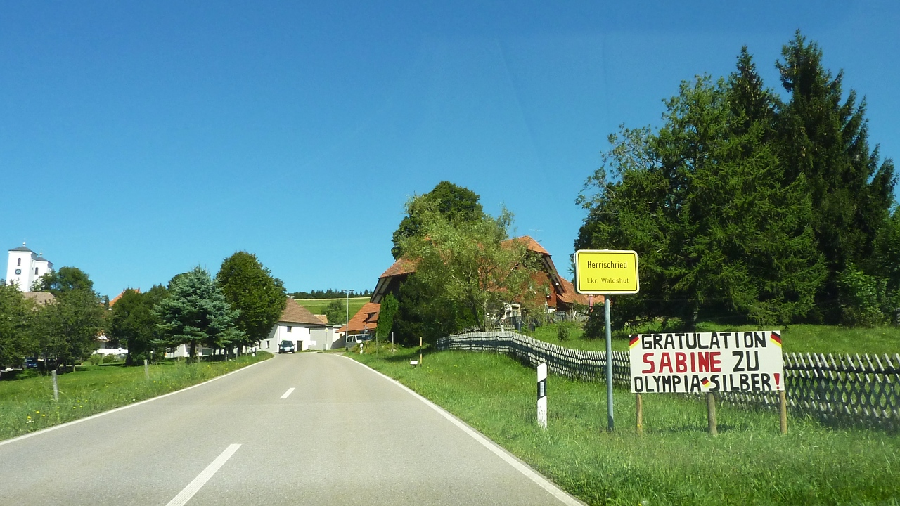 Schwarzwald, Hotzenwald, Herrischried Ortseingang